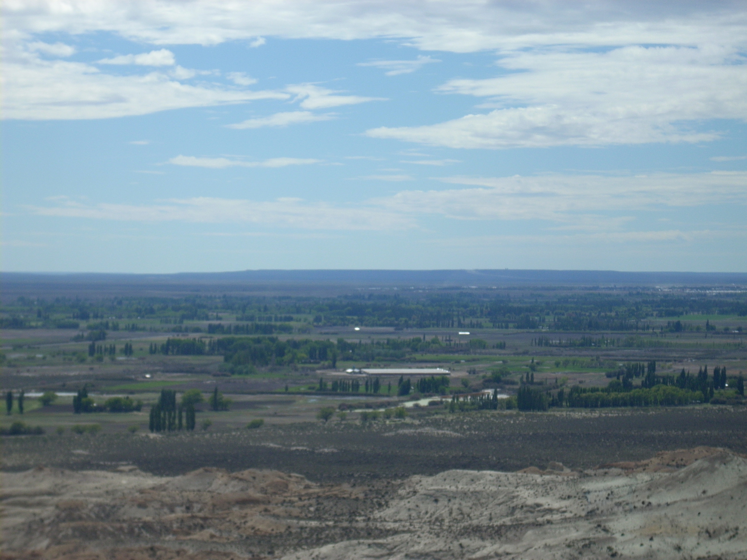 Vista del Valle inferior del río Chubut desde el Geoparque Bryn Gwyn